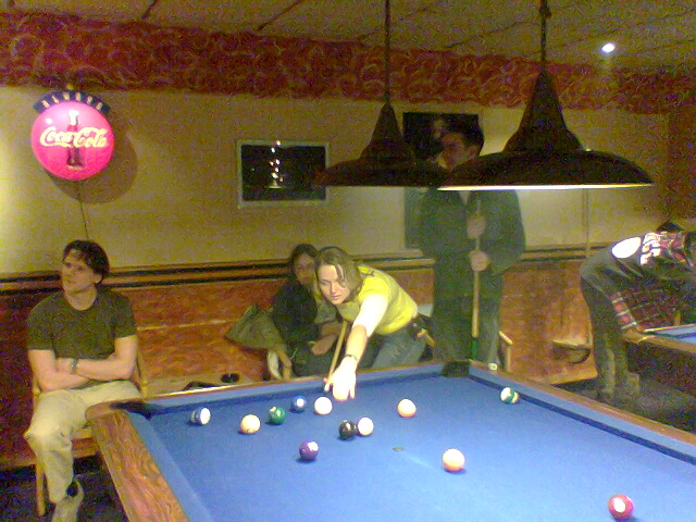 Billard pool.